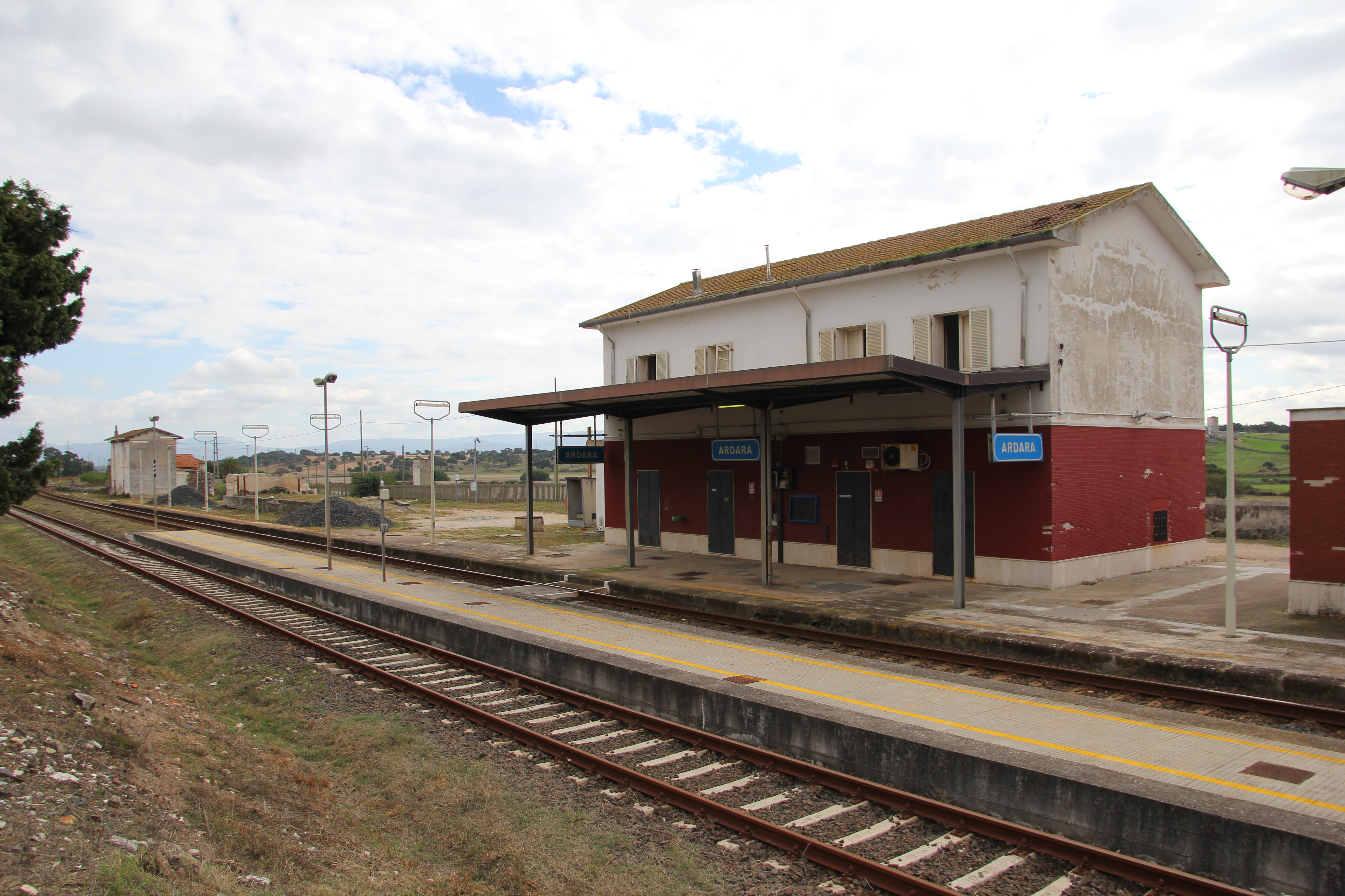 Ardara - Stazione ferroviaria